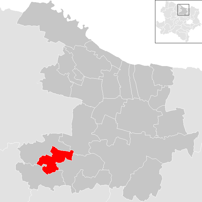 Bezirk Hollabrunn